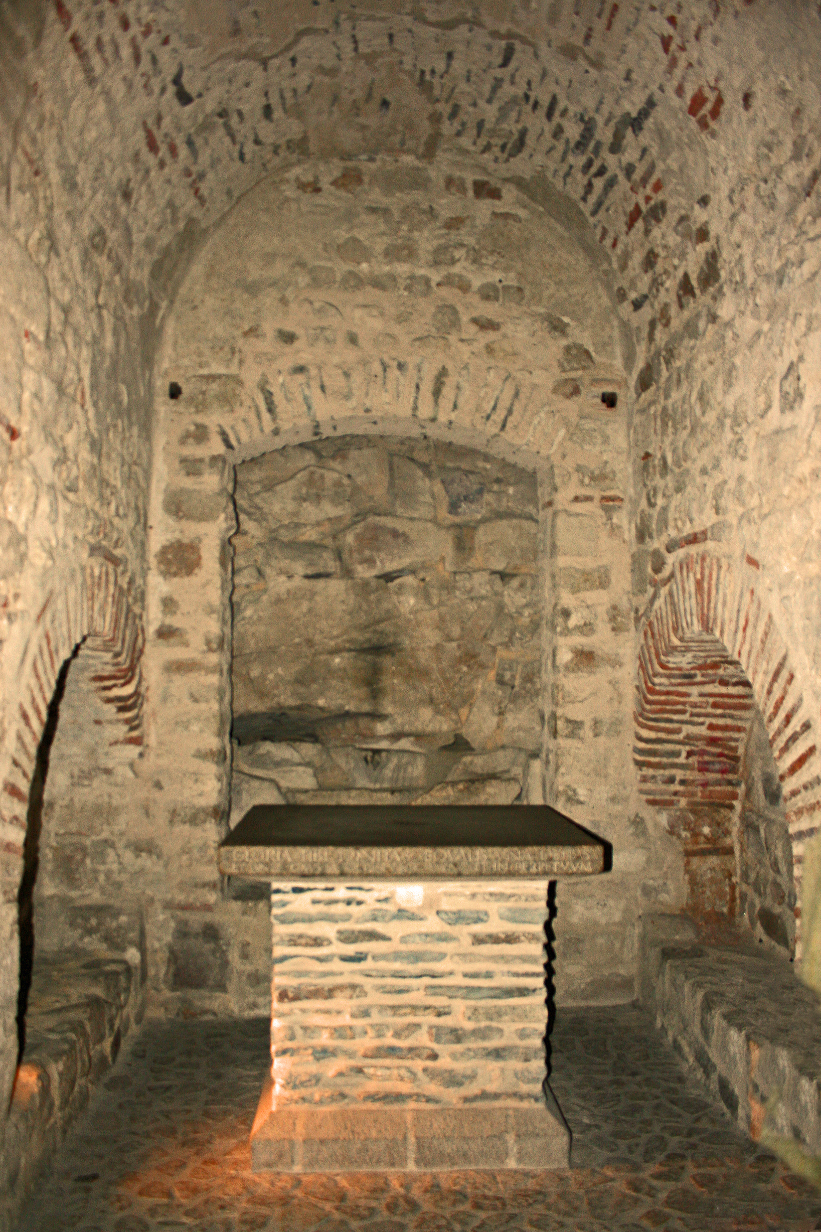 Notre-Dame-sous-Terre : mur du fond et ouverture montrant les vestiges de l'oratoire de saint Aubert (708).